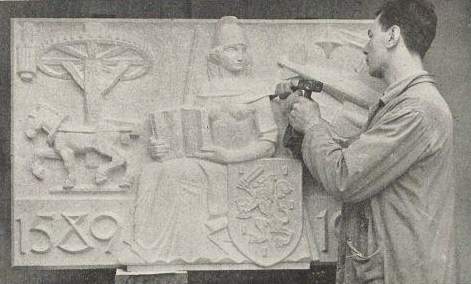 Dirk Bus werkend aan de gevelsteen voor het kantoorgebouw van de Octrooiraad aan het Willem Witsenplein in Den Haag, opgeleverd in 1933.